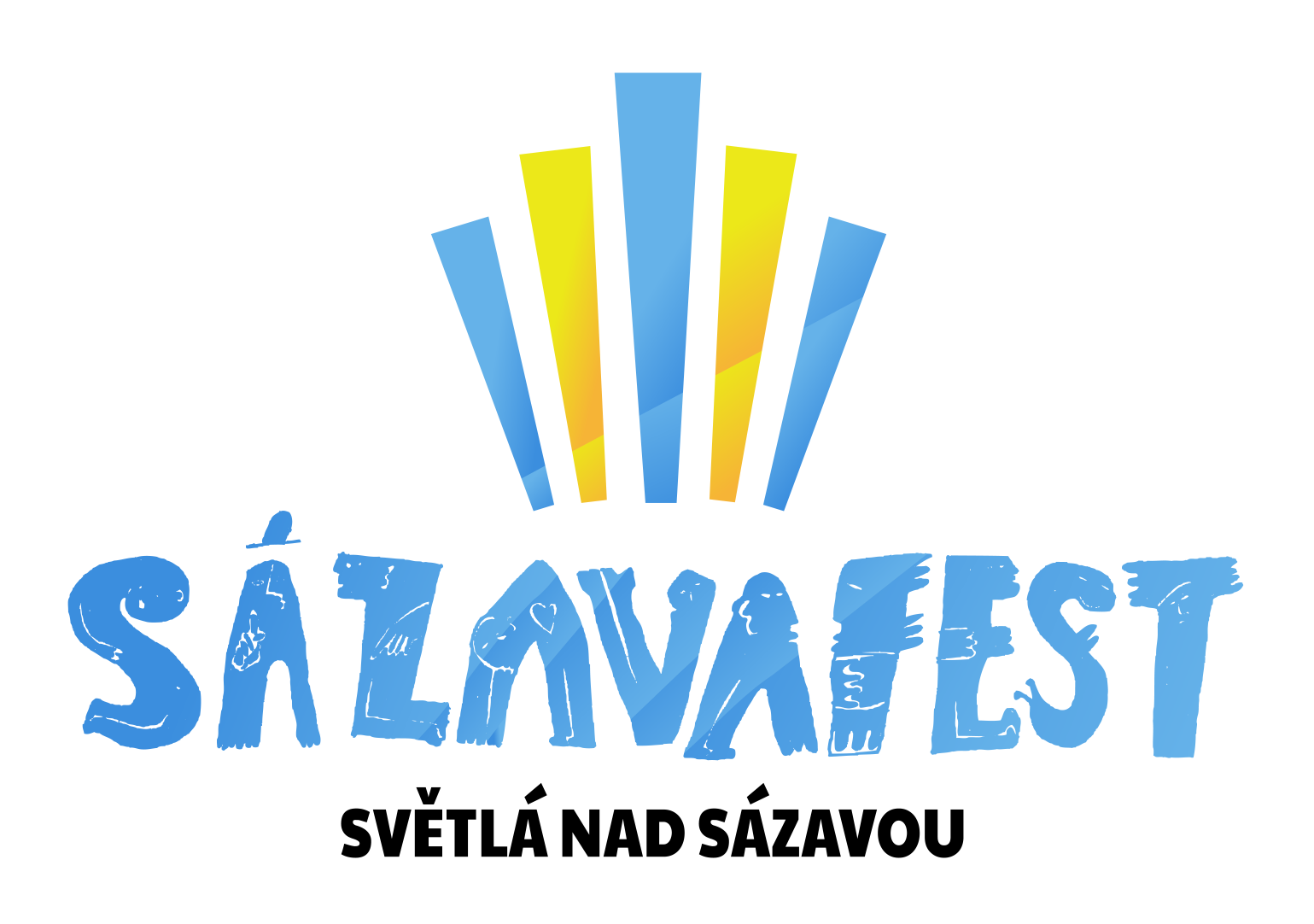 Logo SÁZAVAFESTU používané od ročníku 2016